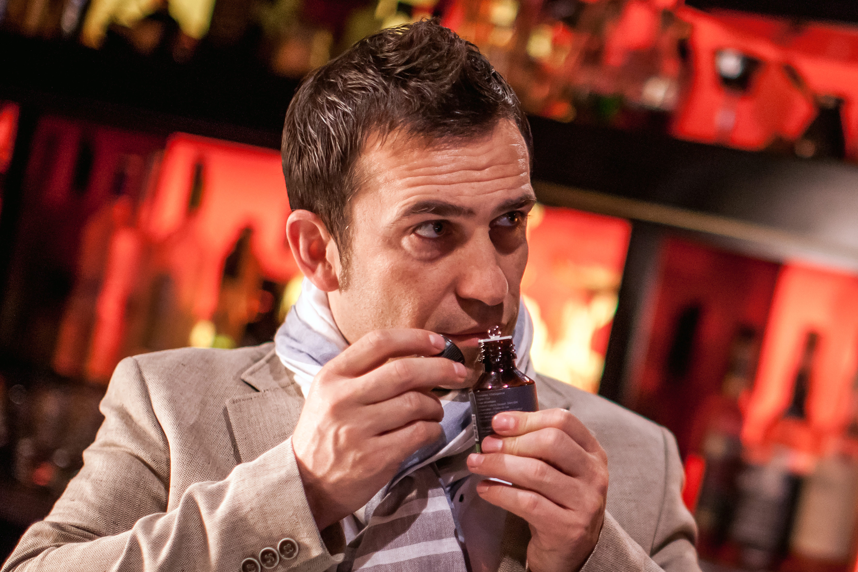 Jean-Charles Sommerard : parfumeur et créateur de signatures sensorielles